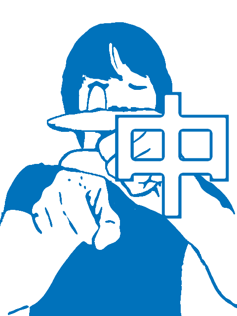 日本手話の「中」2007.04,03-Yokohama.